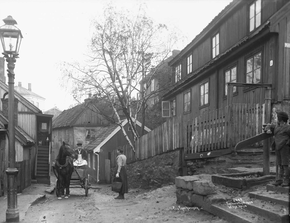 Energauggata 7 og 5 på venstre side av gata. På høyre side nummer 8 (nærmest), 6 og 4. Flisberget opp mot høyre. Foto: Anders Beer Wilse/Oslo Museum, 1903.